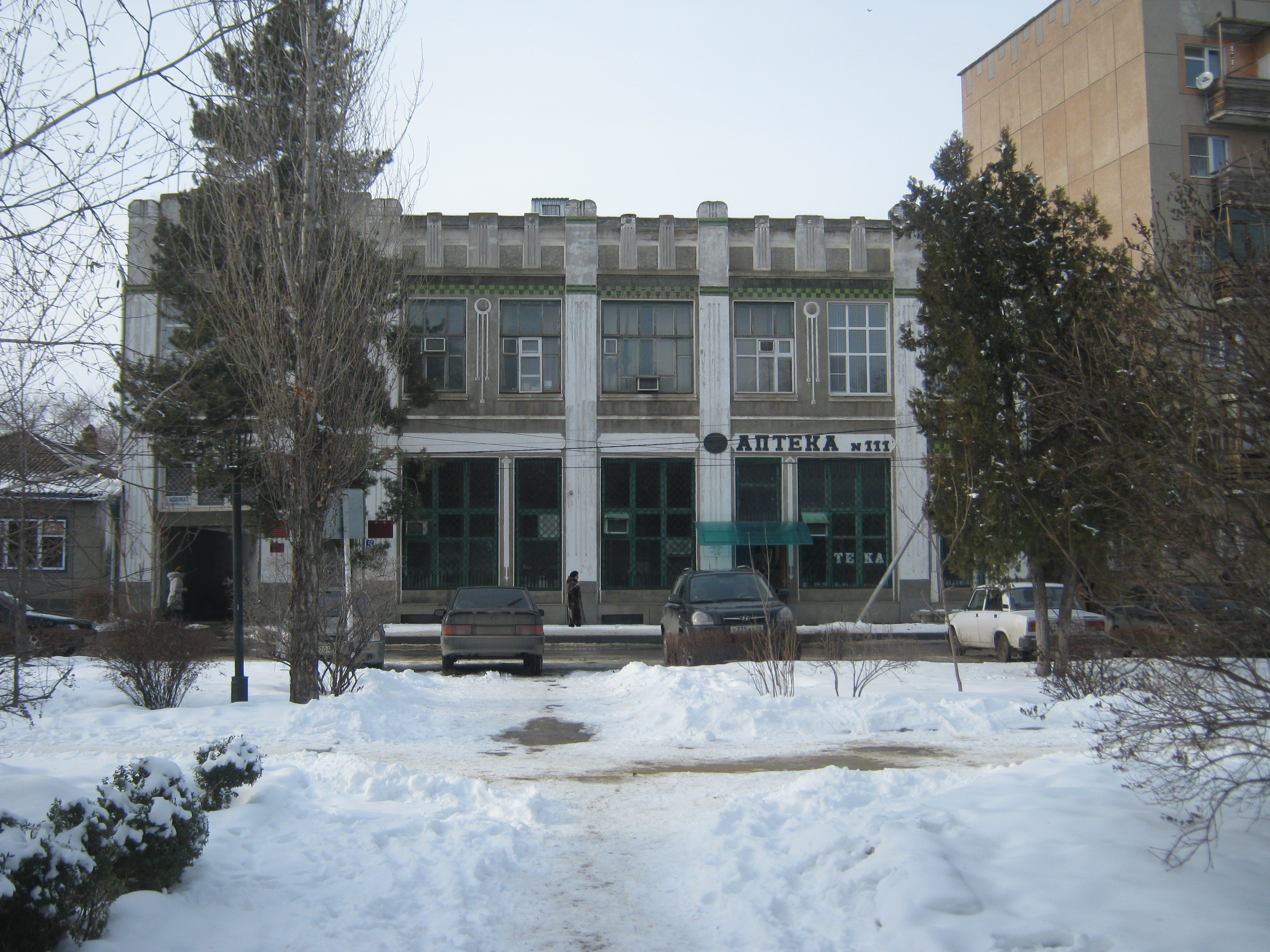 Здание аптеки (1882 год постройки) в городе Светлограде.До революции здание принадлежало купцу Пашкову. В нем находился постоялый гостиный двор с комнатами отдыха и проживания на 2 этаже, а внизу находились просторная смешанная лавка и трактир.